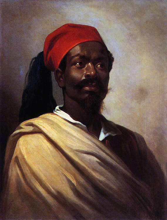 O Negro